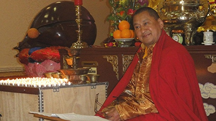 Le Vénérable Lama Tharchin Rinpoché